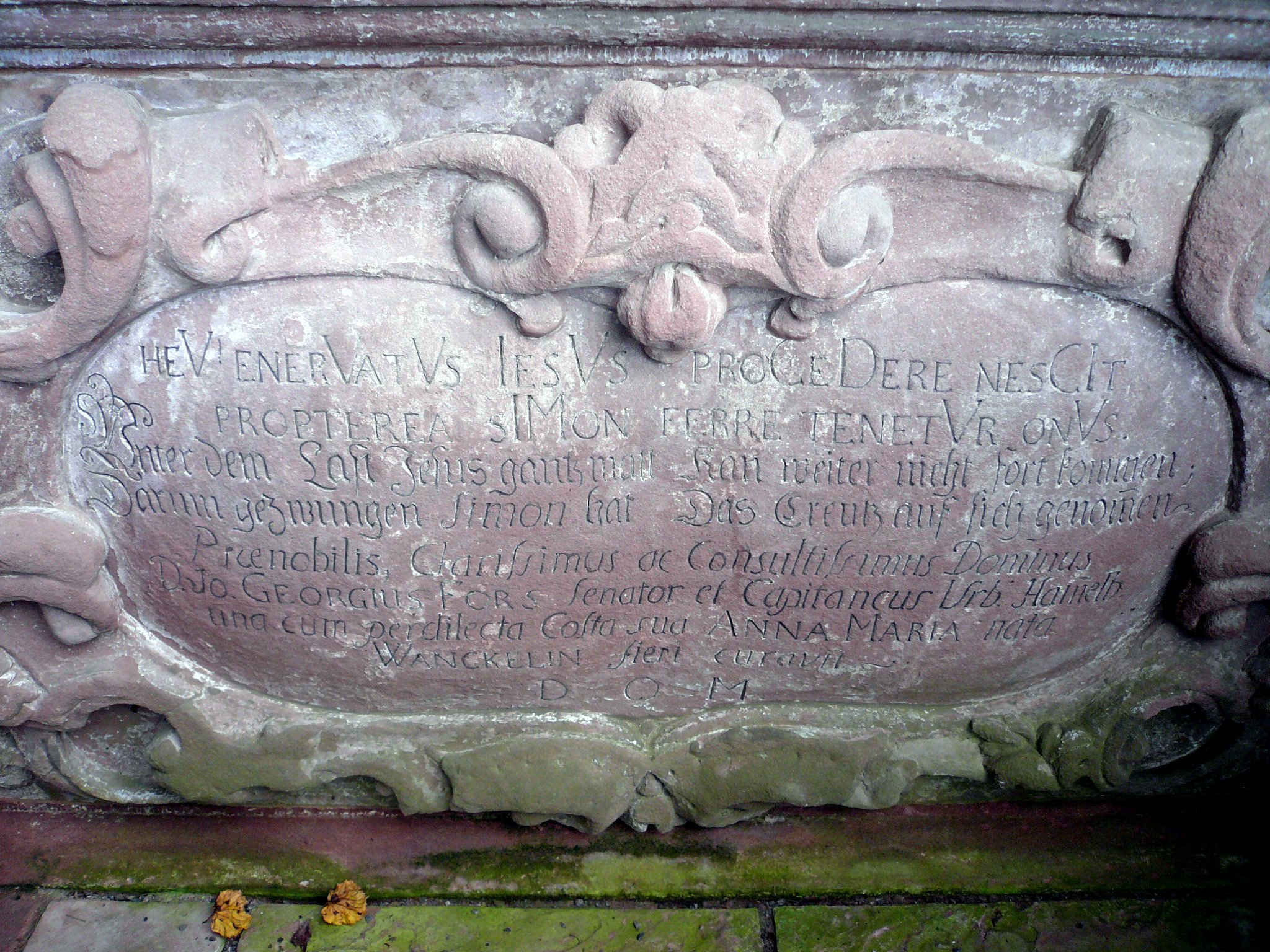 Kapellenkreuzweg Kloster Altstadt, Station 5, Kartuscheninschrift